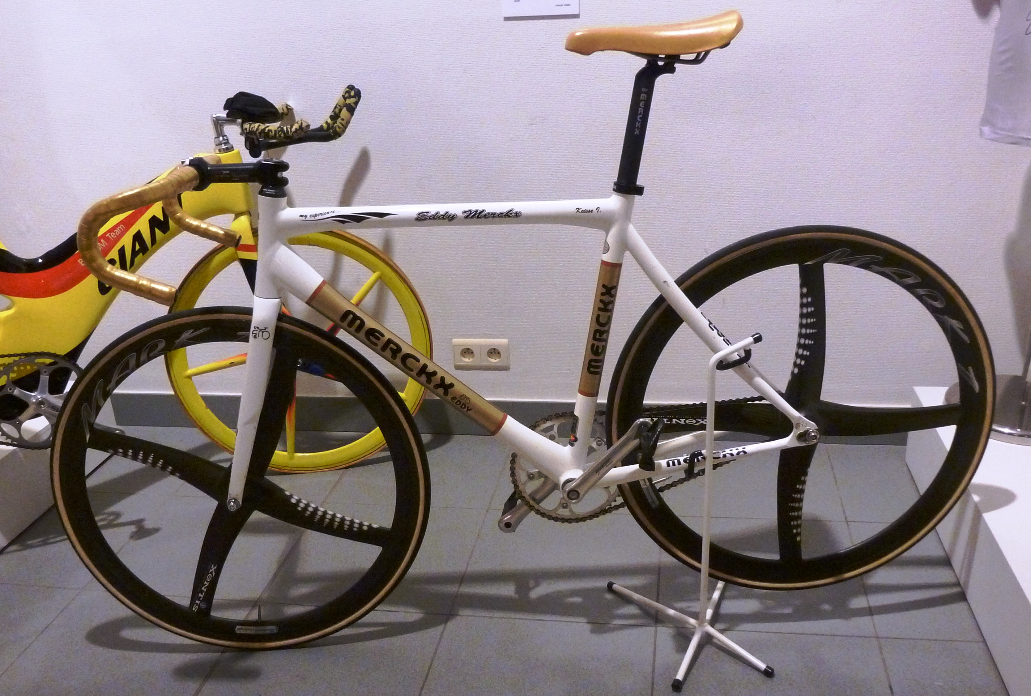 Bahnrad von Eddy Merckx, 1983, im National Wielermuseum in Roeselaere, Belgien